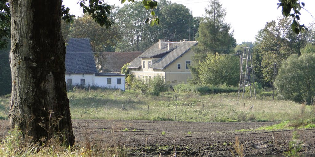 Pasternak - widok na pałac